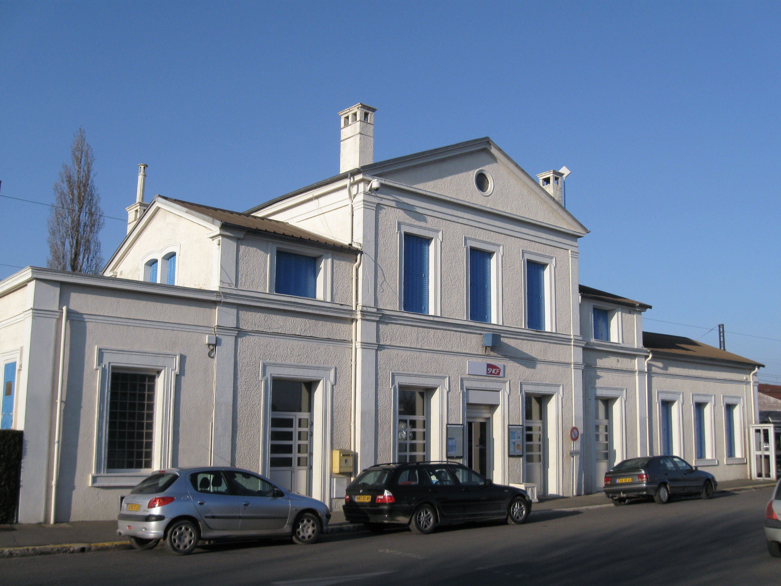 Gare de Meung-sur-Loire, Loiret, France